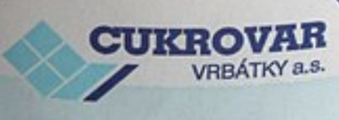 Logo společnosti Cukrovar Vrbátky a.s.